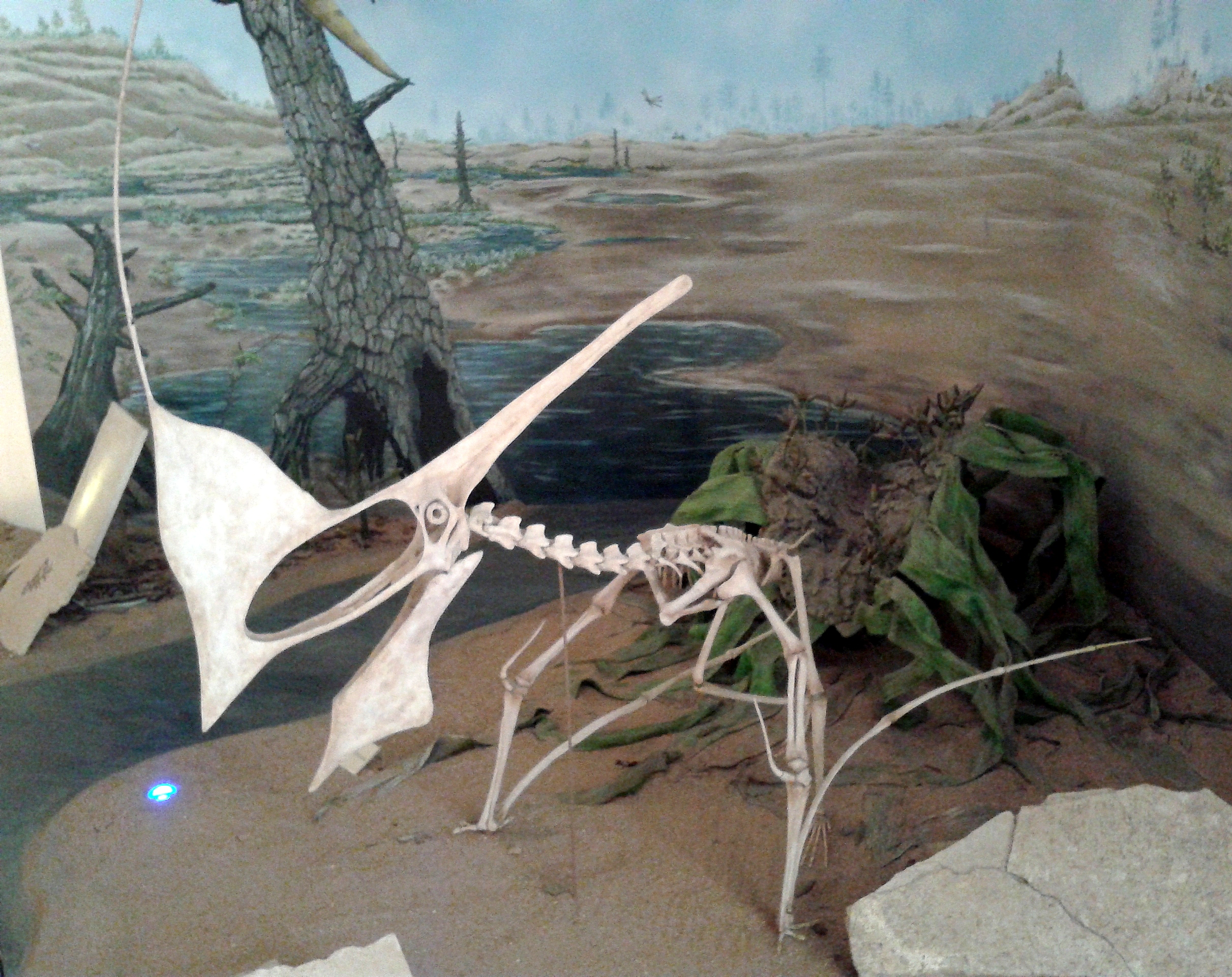 Classification: Pterosauria, Tapejarinae